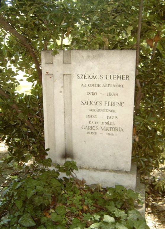 Székács Elemér (Pest, 1870. szept. 23. – Bp., 1938. máj. 16.): növénynemesítő és gyakorlati gazda és Székács Ferenc agrármérnök (1902-1978) és felesége, Gerics Viktória (905-1981) sírja Budapesten. Kerepesi temető: 41-1-27.